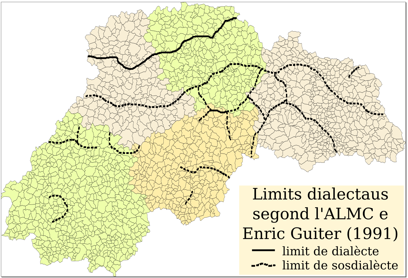 Dialectes e sosdialectes dins l'Atlas linguistic e etnografic dau Massís Centrau segond Enric Guiter. Henri Guiter. "Sur l'Atlas Linguistique de l'Auvergne et du Limousin". Revue de Linguistique Romane n°55, 1991, pp. 101-118.